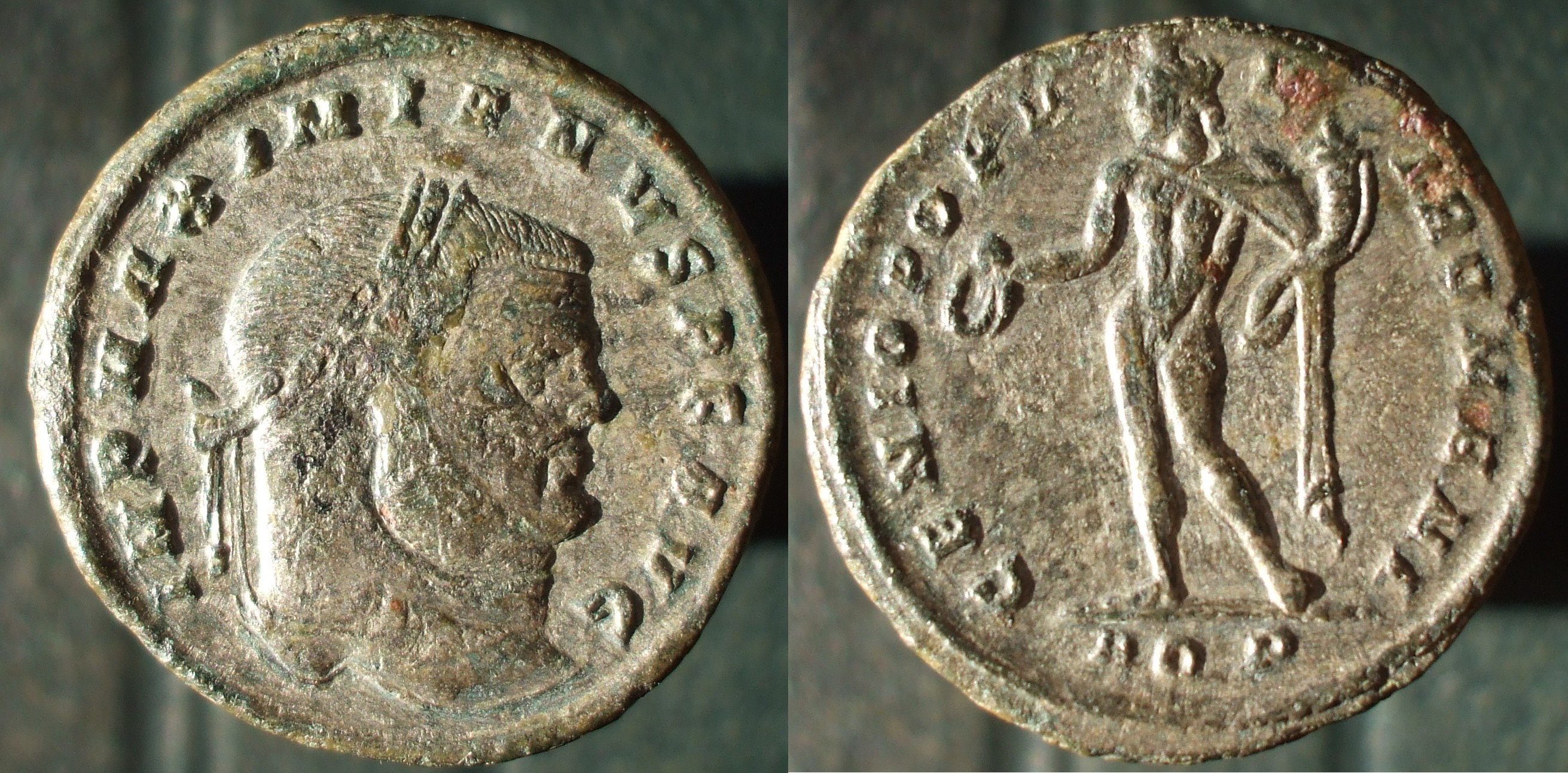 nummus, Maximien Hercule, Aquilée, Genio Populi Romani, Tétrarchie